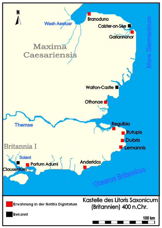 Kastelle des Litus Saxonicum (Sachsenküste) in Britannien, 400 n. Chr.